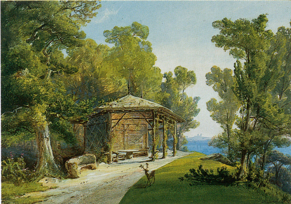 Klein Glienicke, Großer Jagdschirm (nicht erhalten), Adalbert Lompeck, 1852